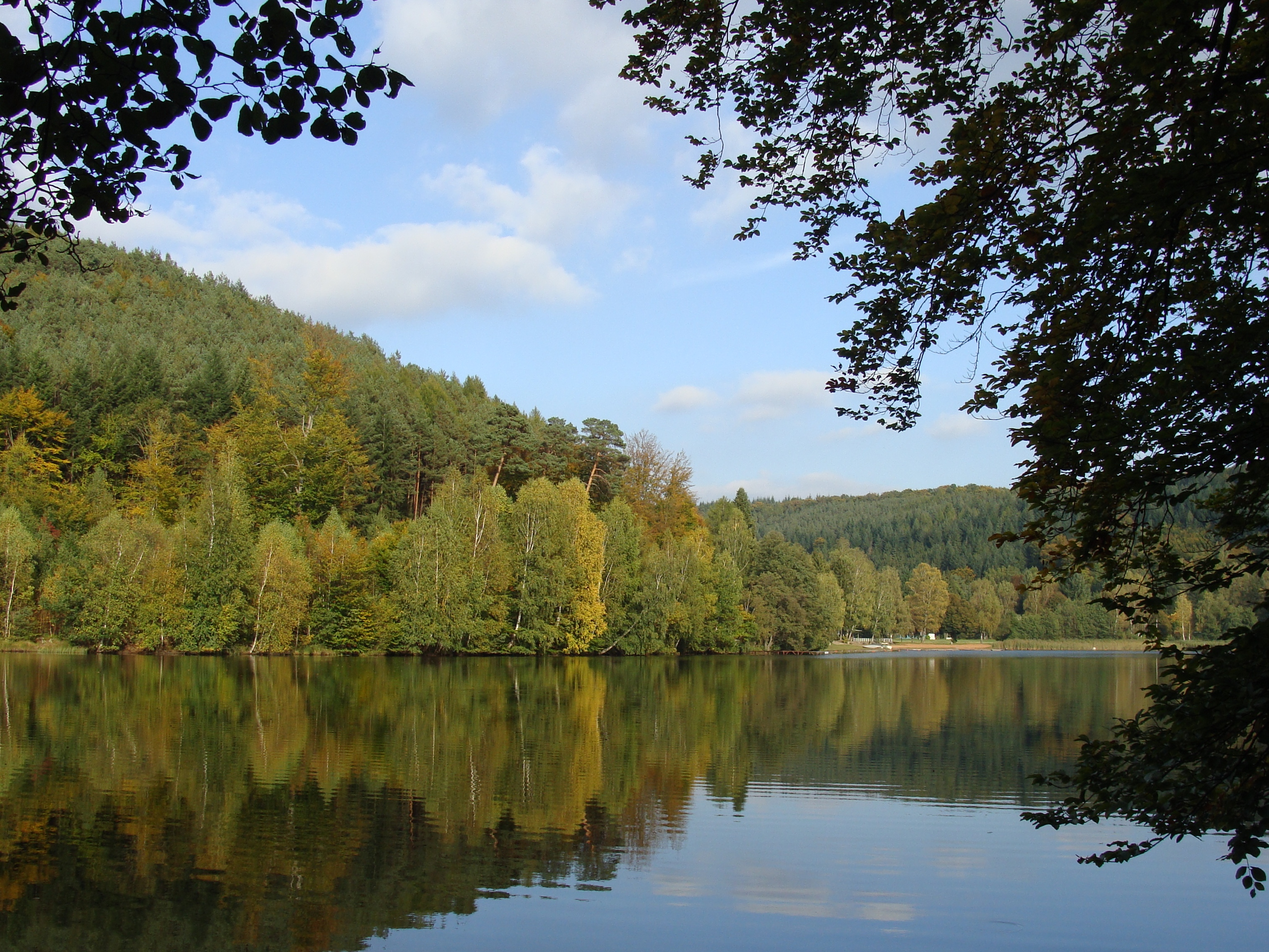 Gelterswoog bei Hohenecken/Kaiserslautern